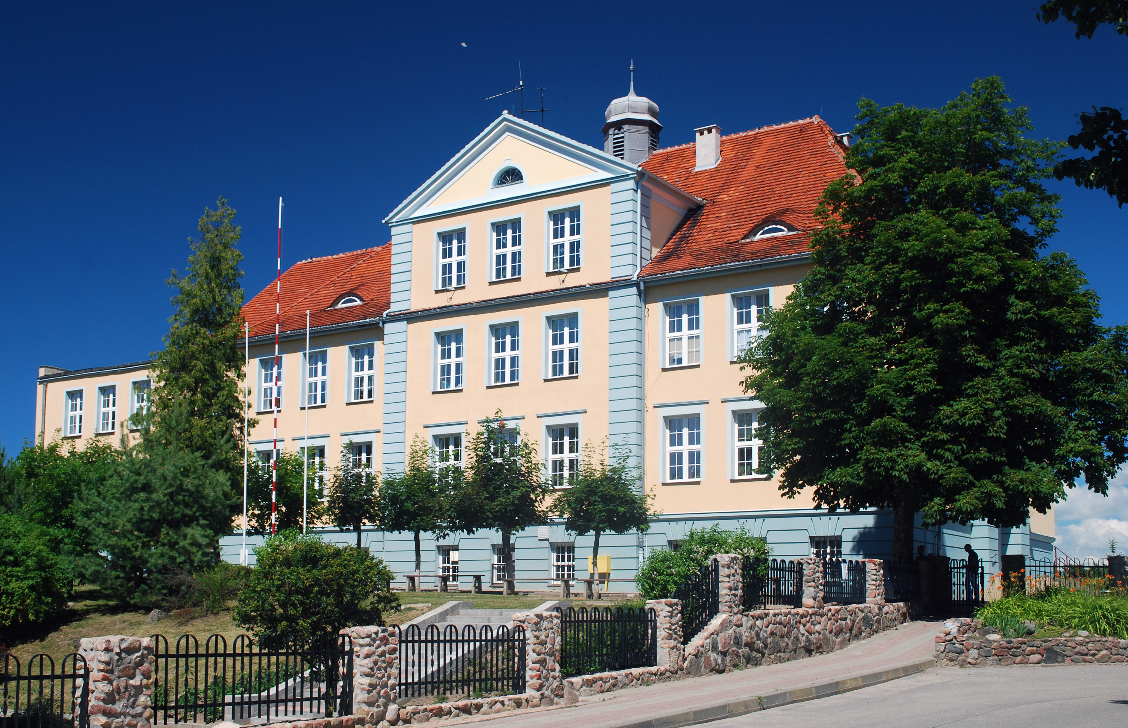 Szkoła Podstawowa w Dzierzgoniu.